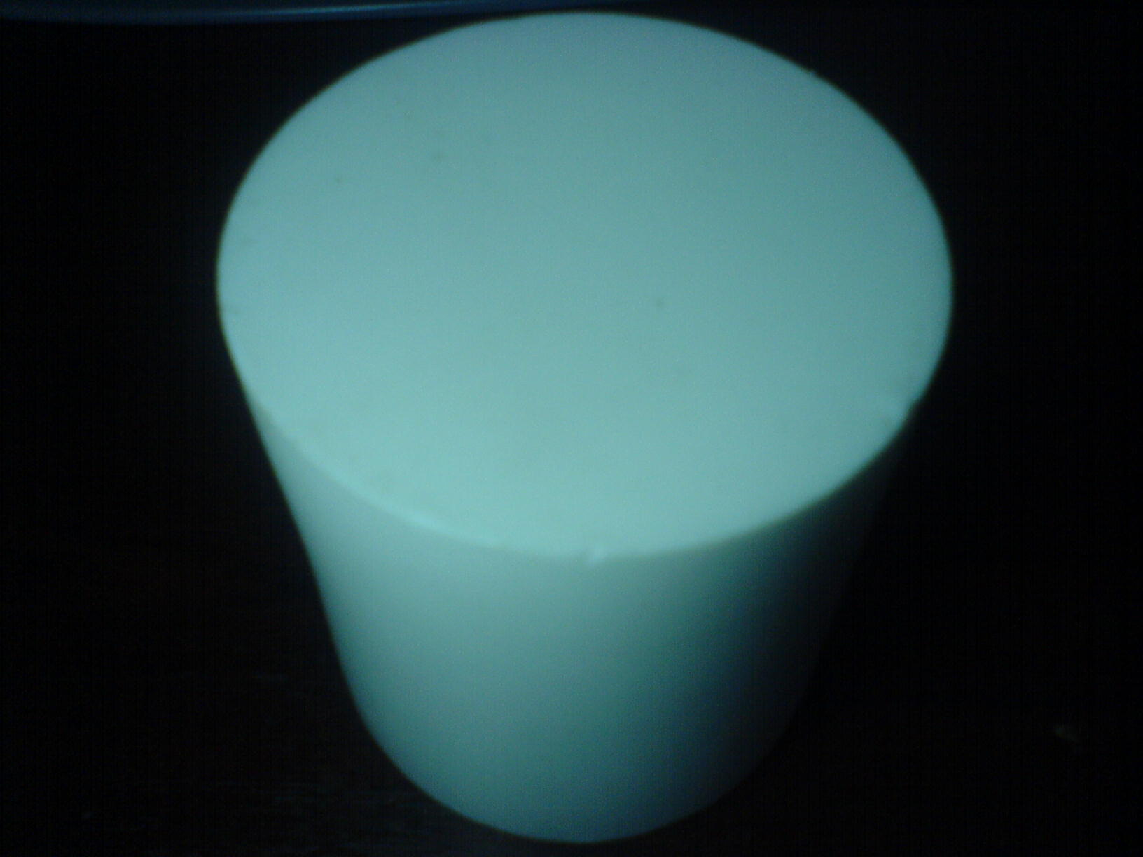 Фторопласт-4 (прессованый цилиндр)